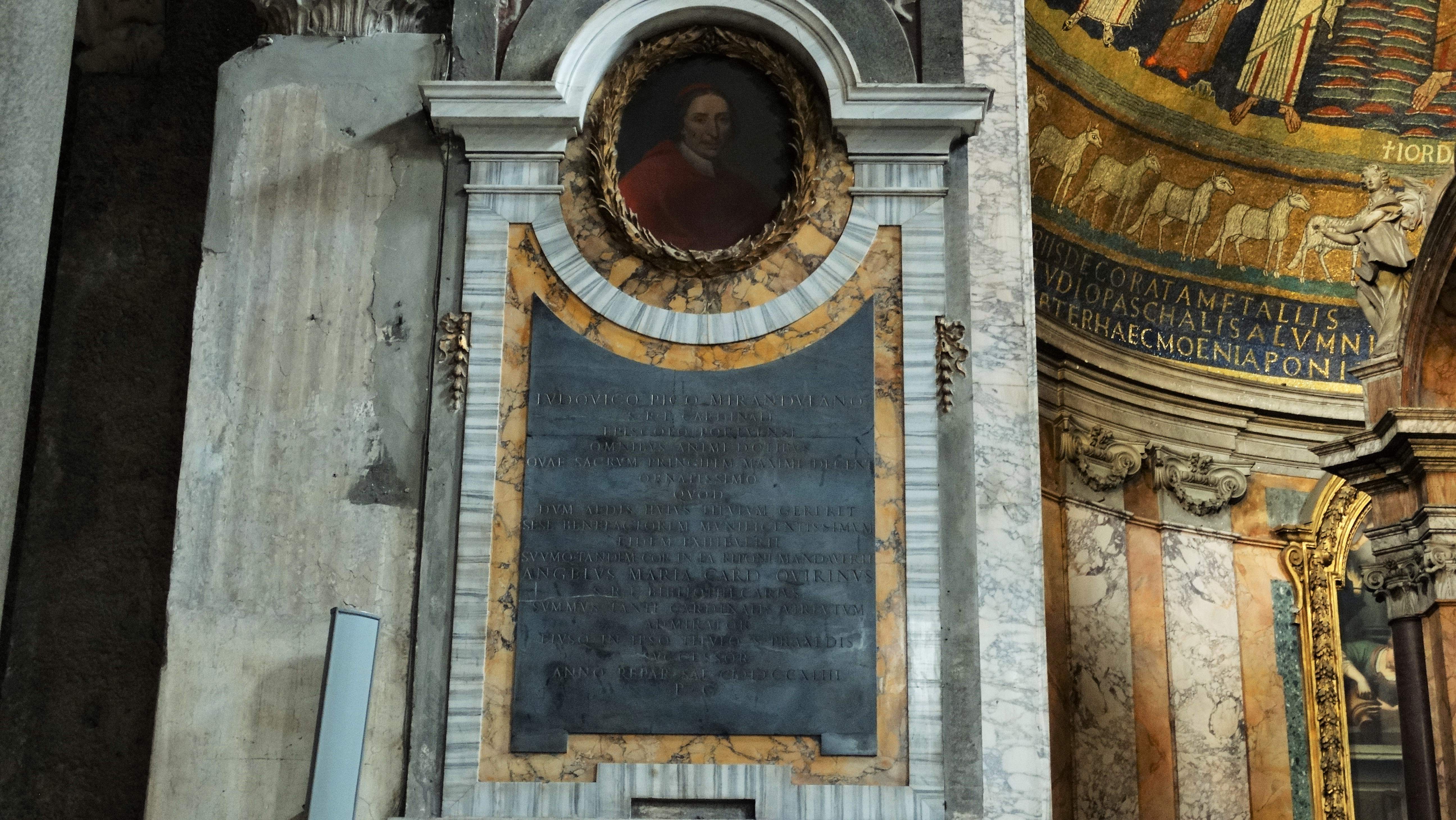 Lapide commemorativa di Lodovico Pico Della Mirandola, Cardinale Presbitero dal 1728 al 1731